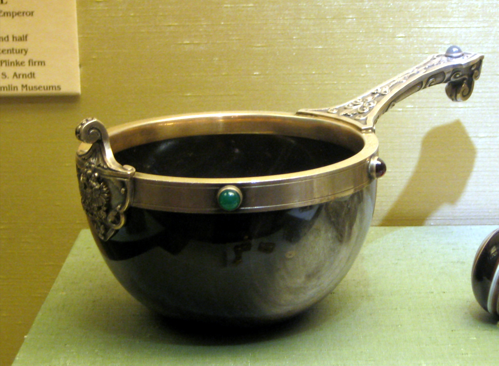 Ковш. Спб, 1908-17. Мастерская Н. Бобира. Обсидиан, хризопразы, гранаты, халцедон, серебро. ГИМ